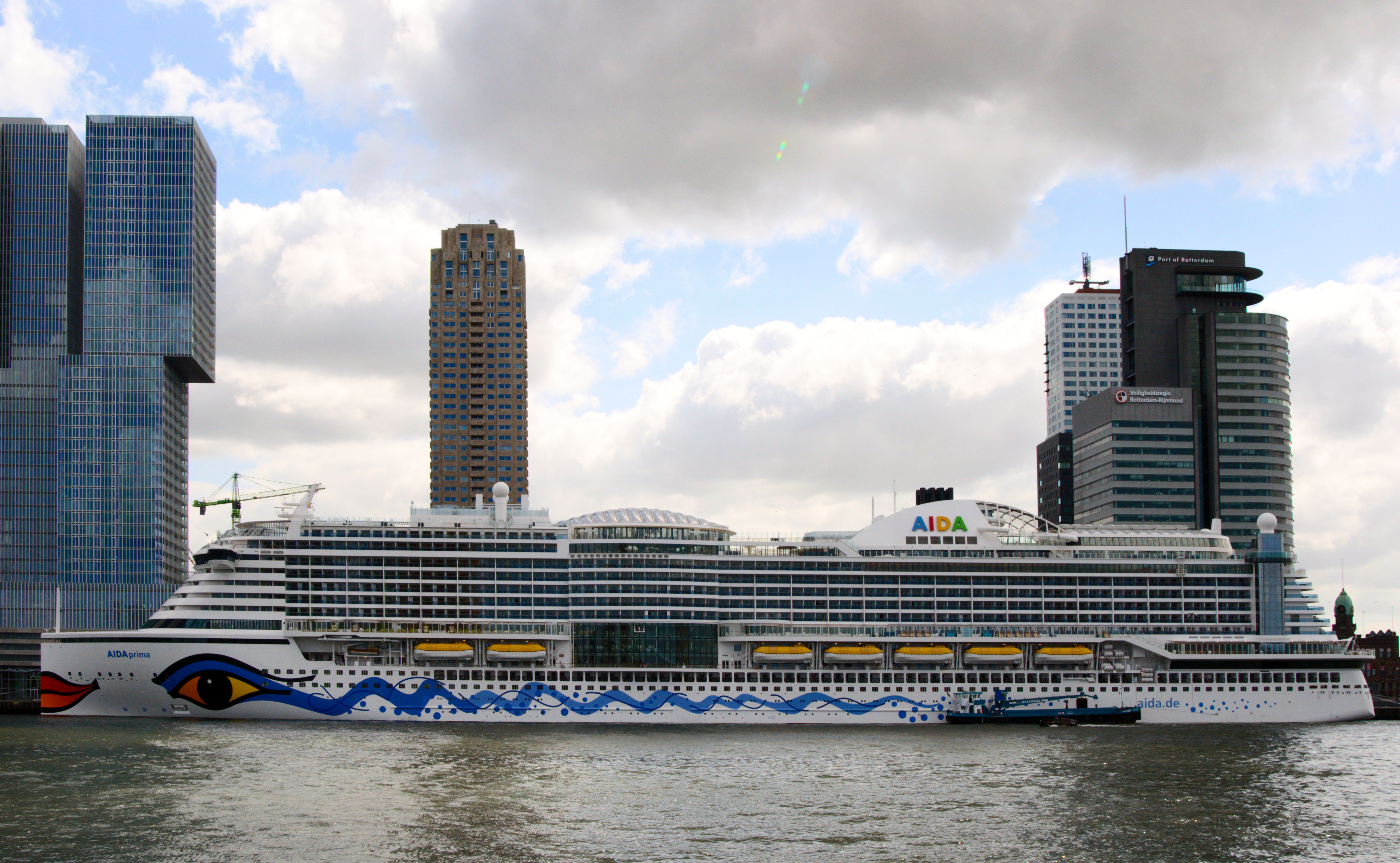 Die AIDAprima im Hafen von Rotterdam